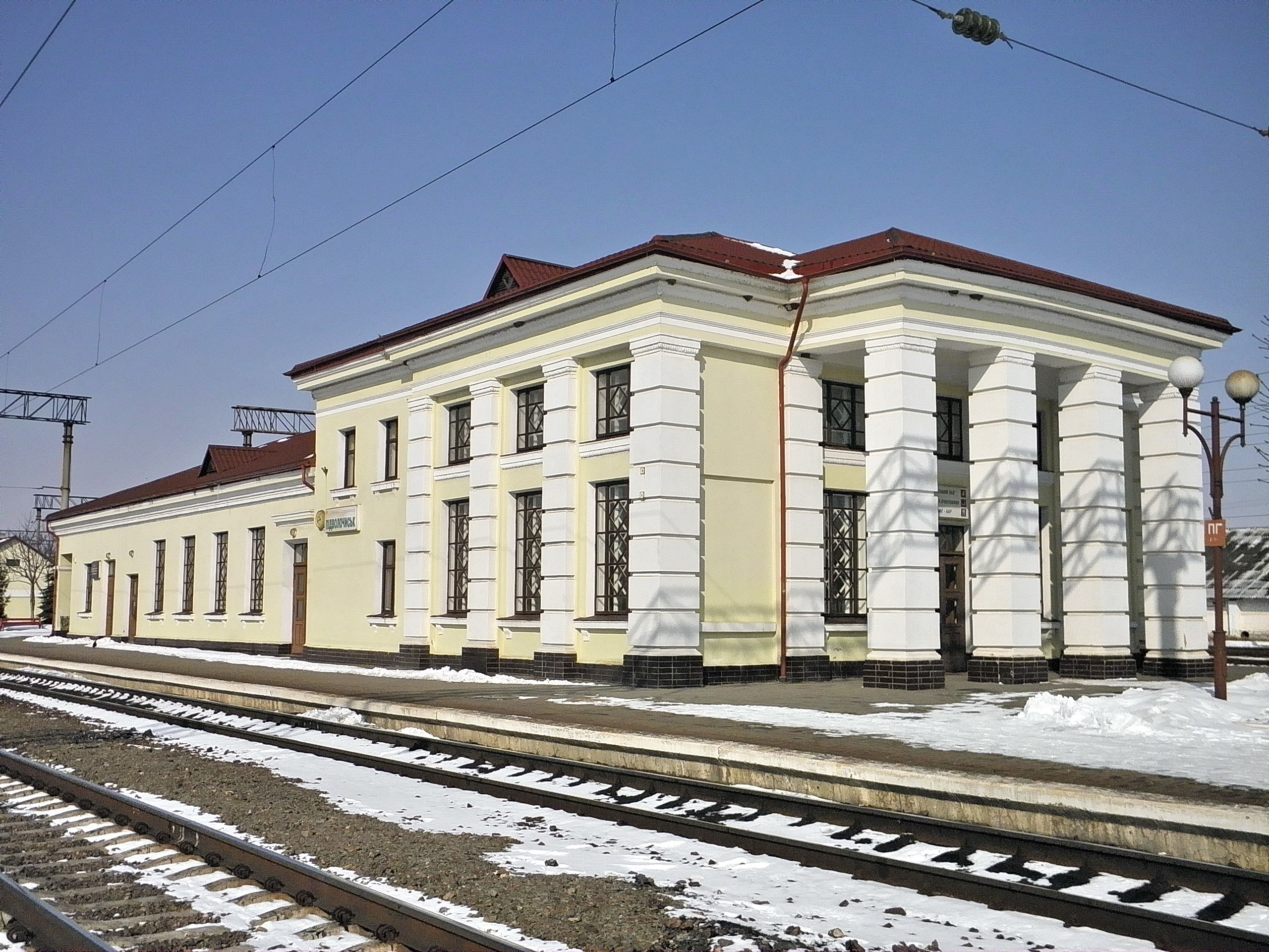 Залізничний вокзал(мур.), Підволочиськ, вул. 22 Січня, 20.